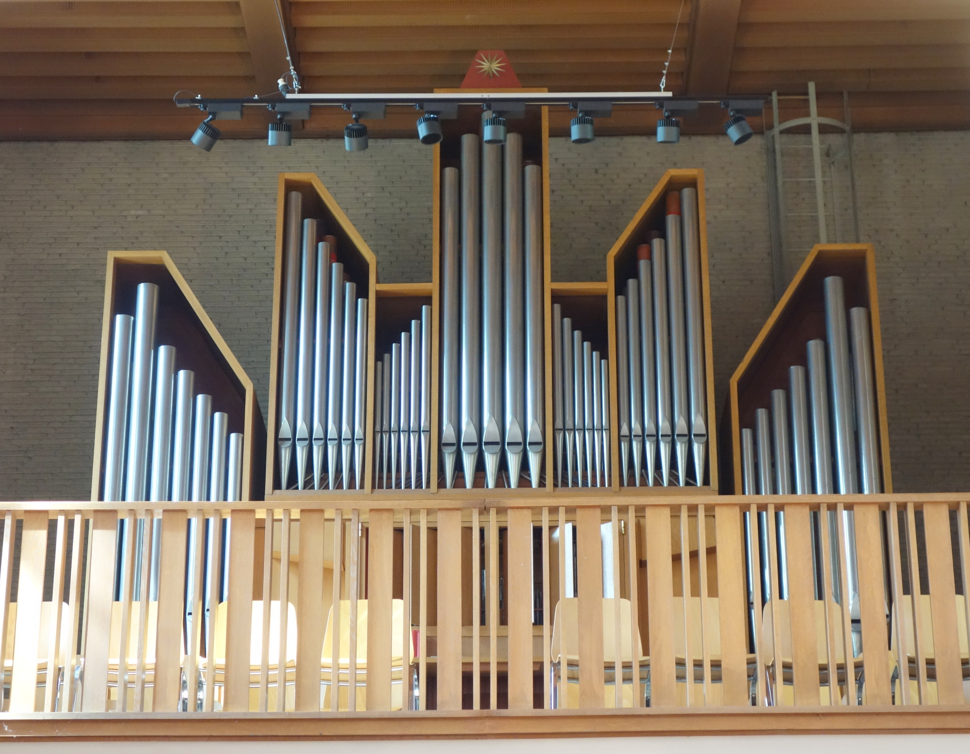 Epiphanienkirche Hamburg-Winterhude, Deutschland